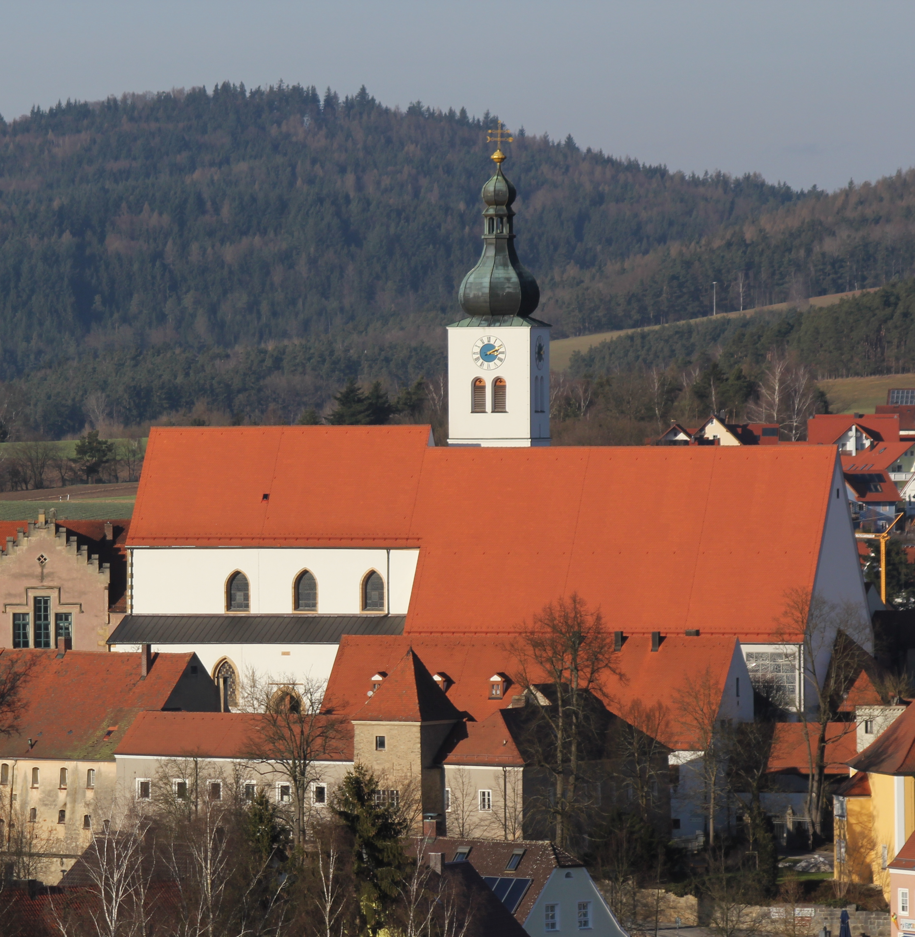 Kath. Pfarrkirche St. Josef, früher St. Georg, Basilika aus dem 14./15. Jh., im 17. Jh. gewölbt, mit Ausstattung; 1965/67 anstelle des alten Ostchores Erweiterungsbau. Denkmal-Nr. D-3-76-147-80 Denkmal-Nr. D-3-76-147-79